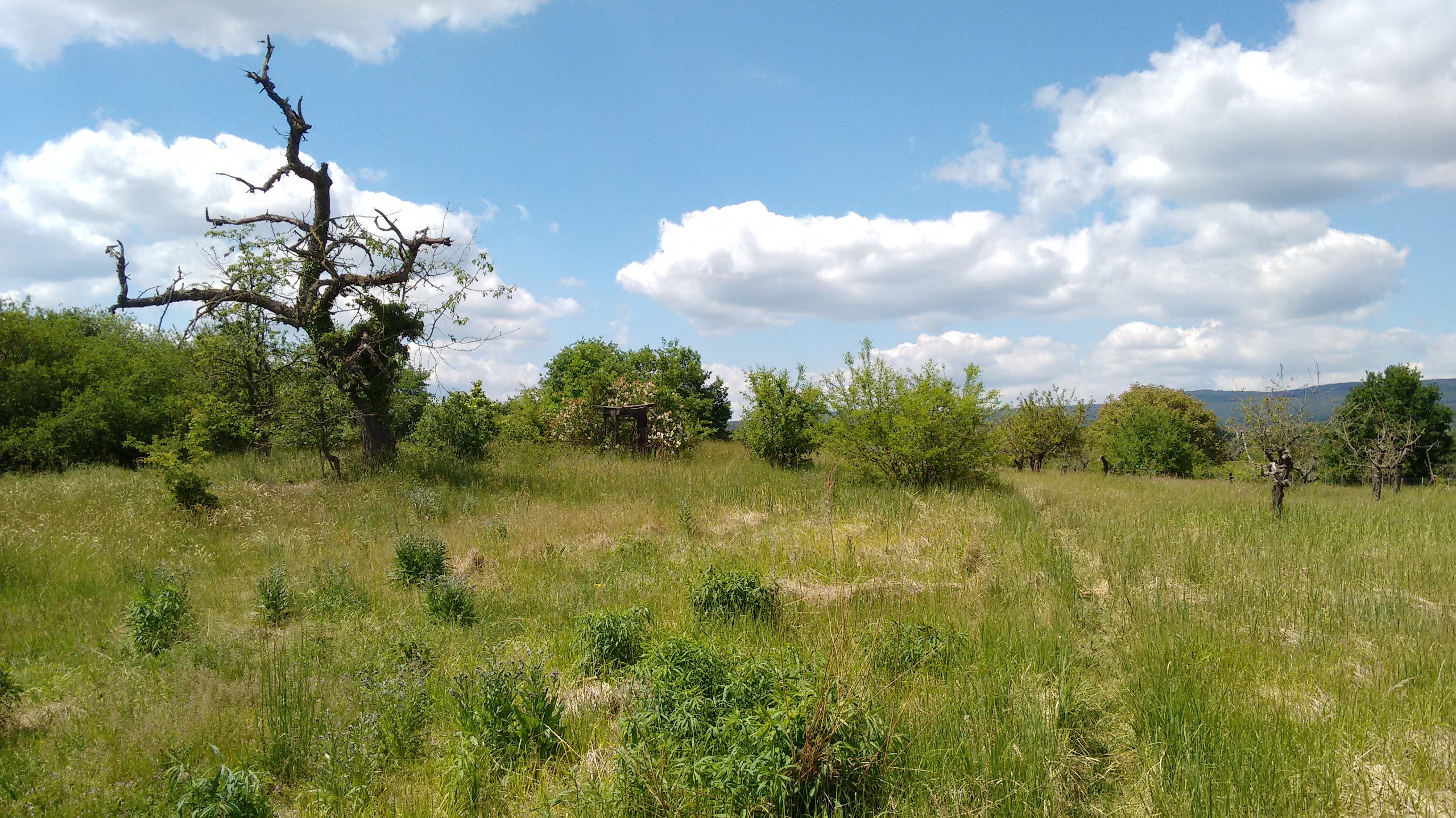 NSG Ingelheimer Dünen und Sande: Blick nach Nordwesten, im Hintergrund ist der Taunuskamm zu sehen